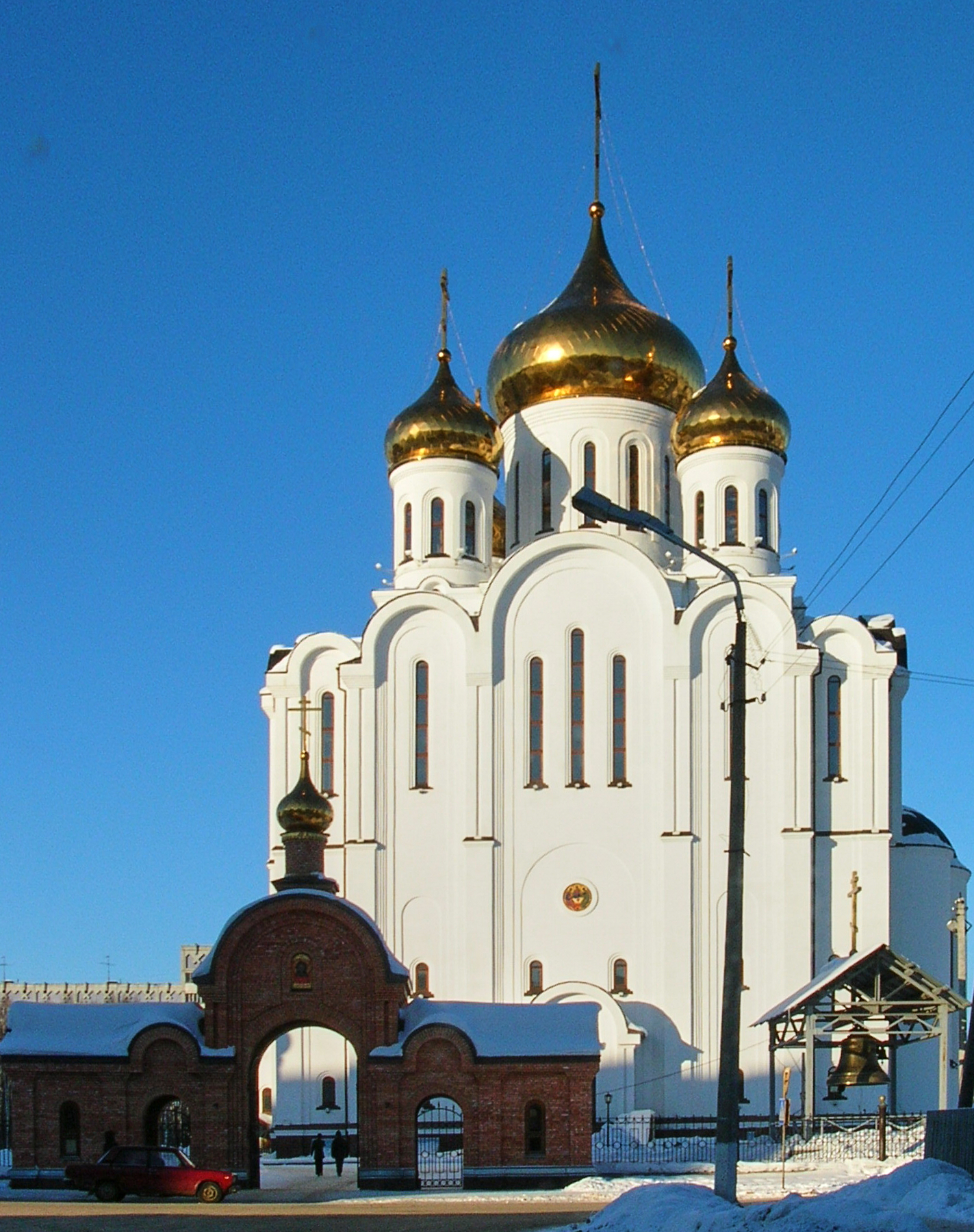 Syktyvkar, Komi Republic, Russia